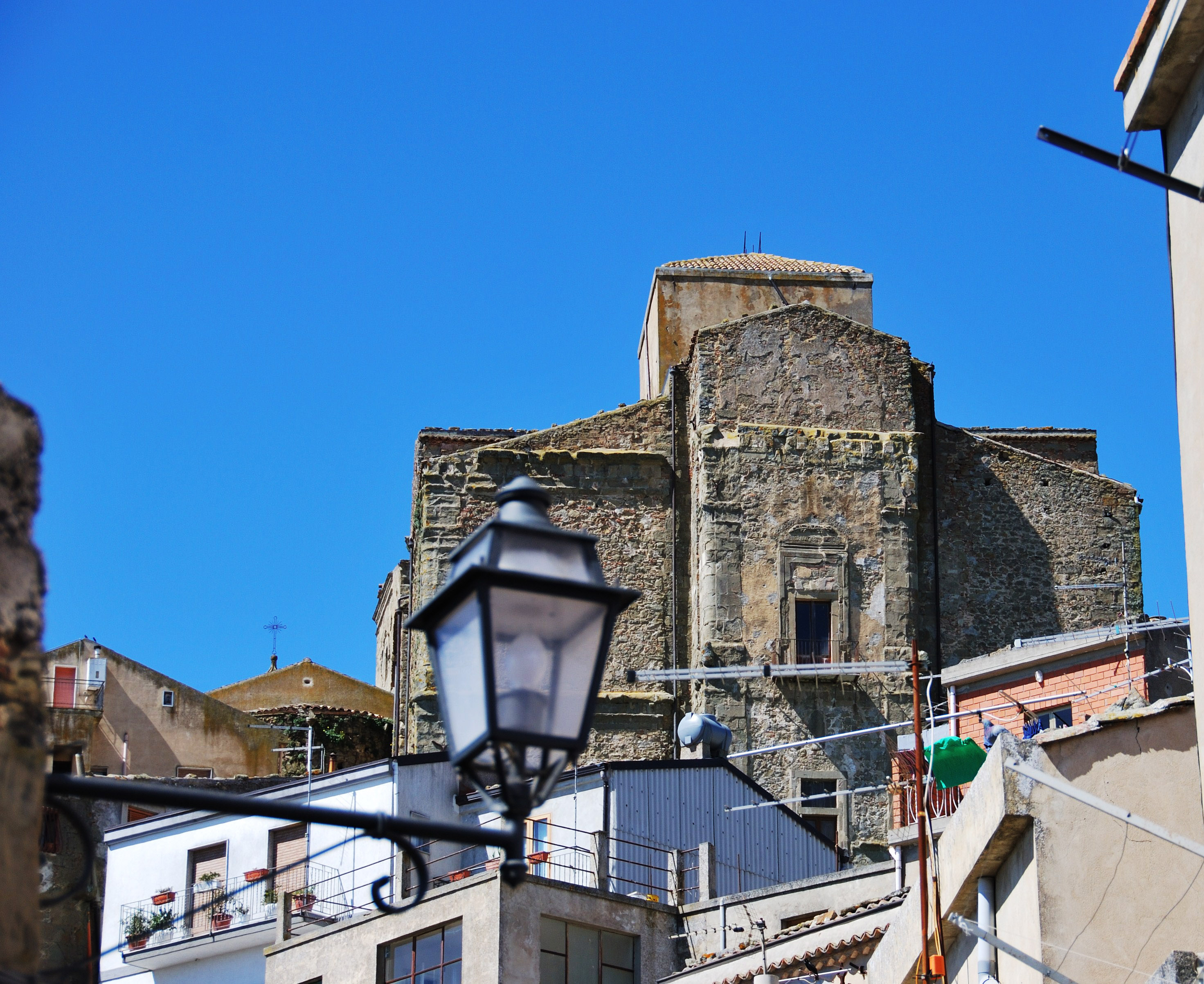 Chiesa Madre vista da lato nord